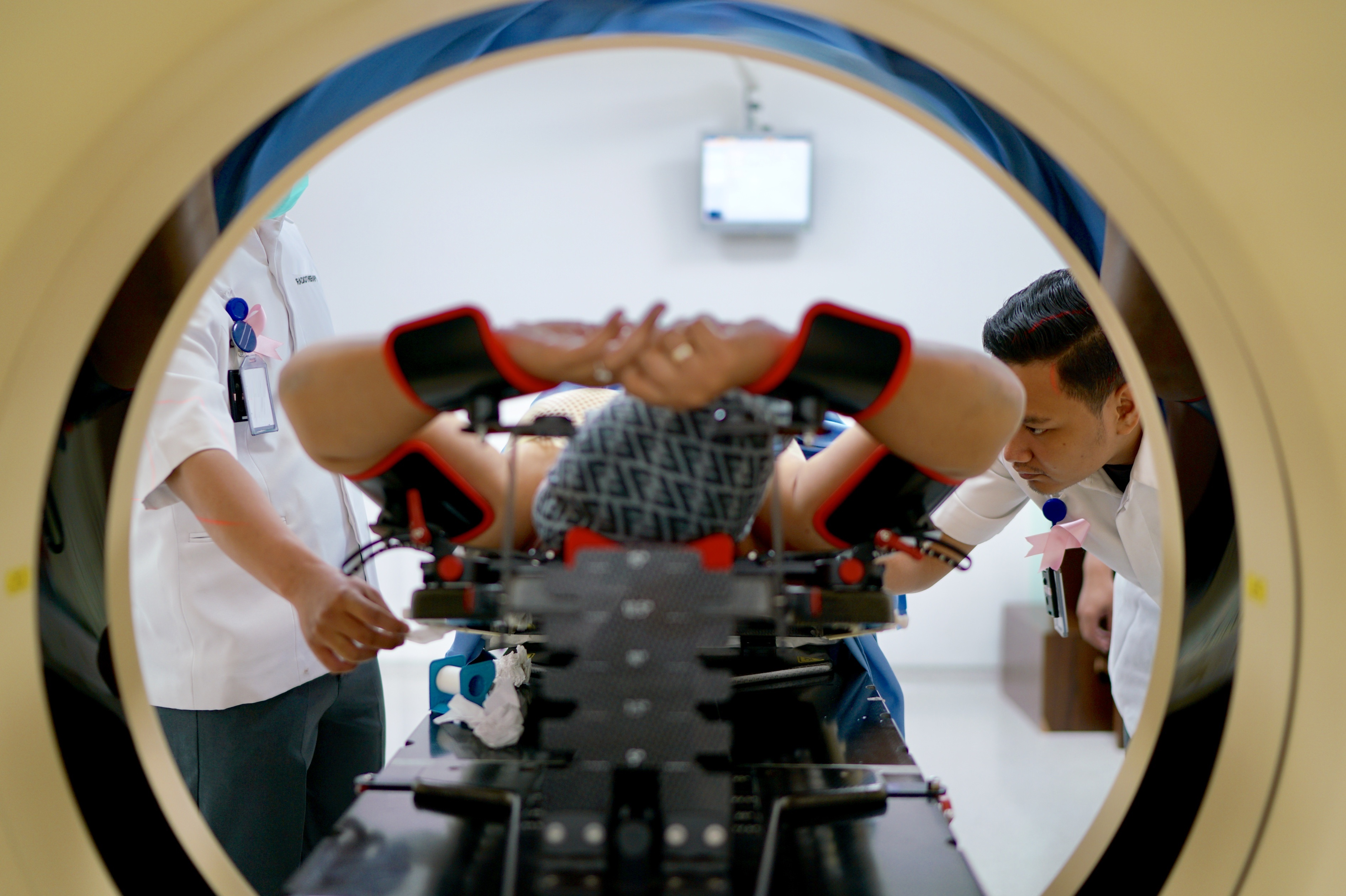 Contoh proses simulasi untuk perencanaan radiasi kanker payudara